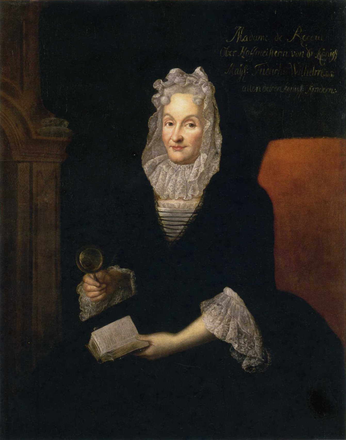 Madame Marthe de Rocoulle. Stiftung Preußische Schlösser und Gärten, GK I 3023